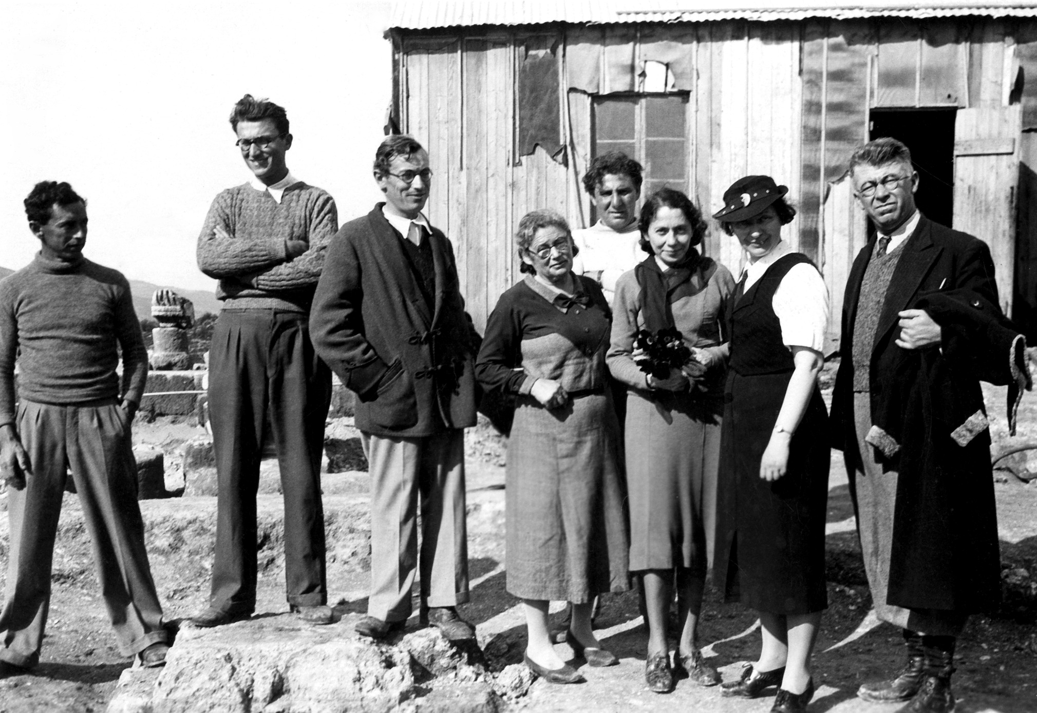 משלחת חפירות בית שערים עם משפחת זייד משה יפה (עומד משמאל), בנימין מזר (עומד שלישי משמאל), ציפורה זייד (עומדת רביעית משמאל), 1930-1939